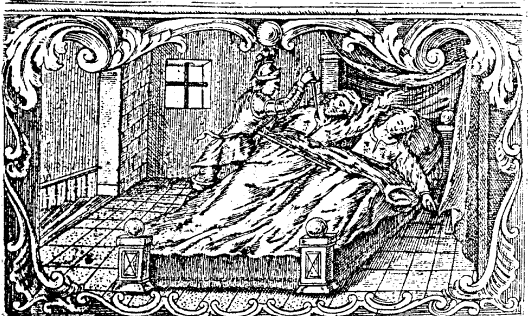 Teodosio Goñikoa gurasoak hiltzen